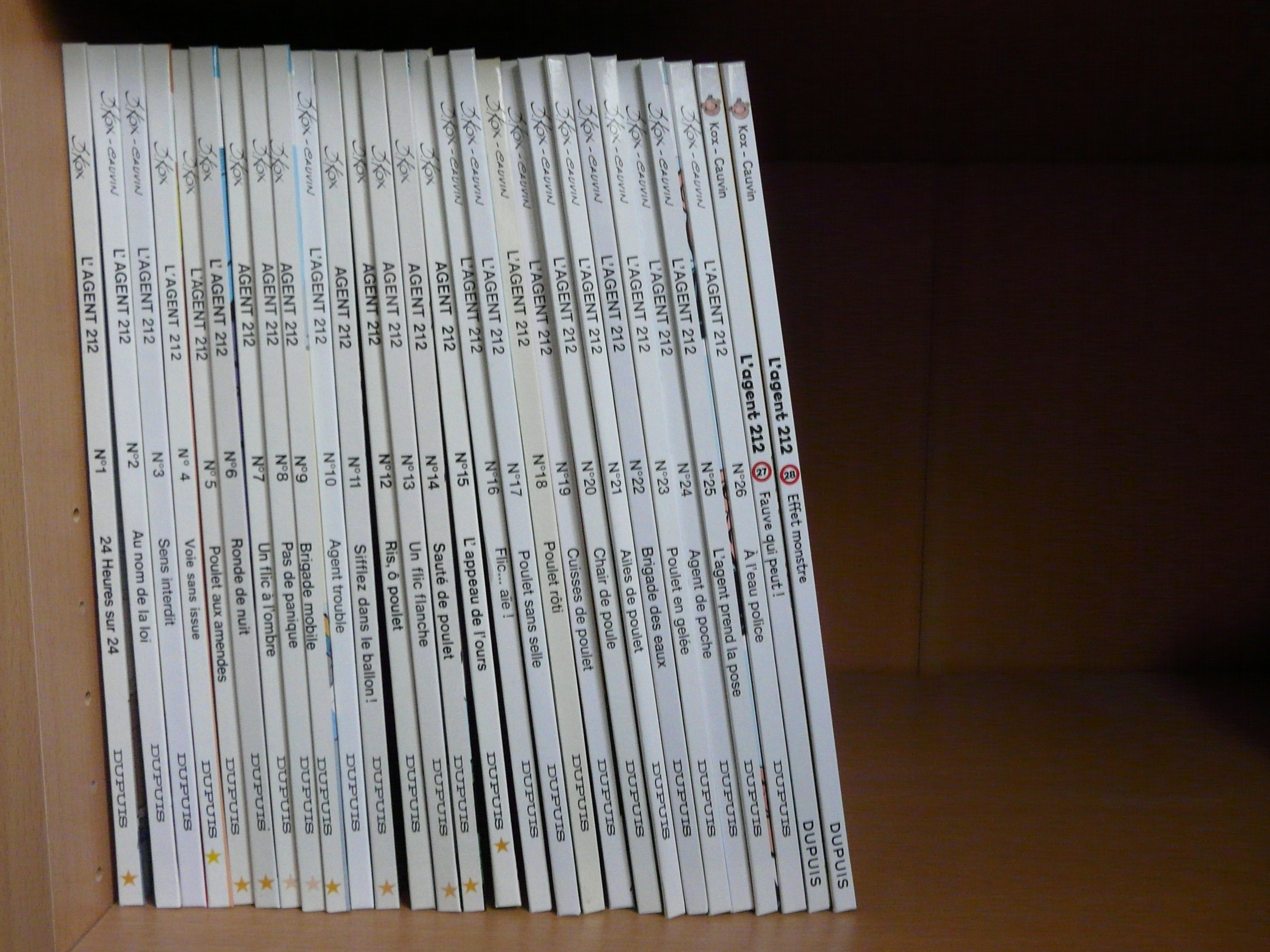 Collection de bande dessinée L'Agent 212, numéros 1 à 28.